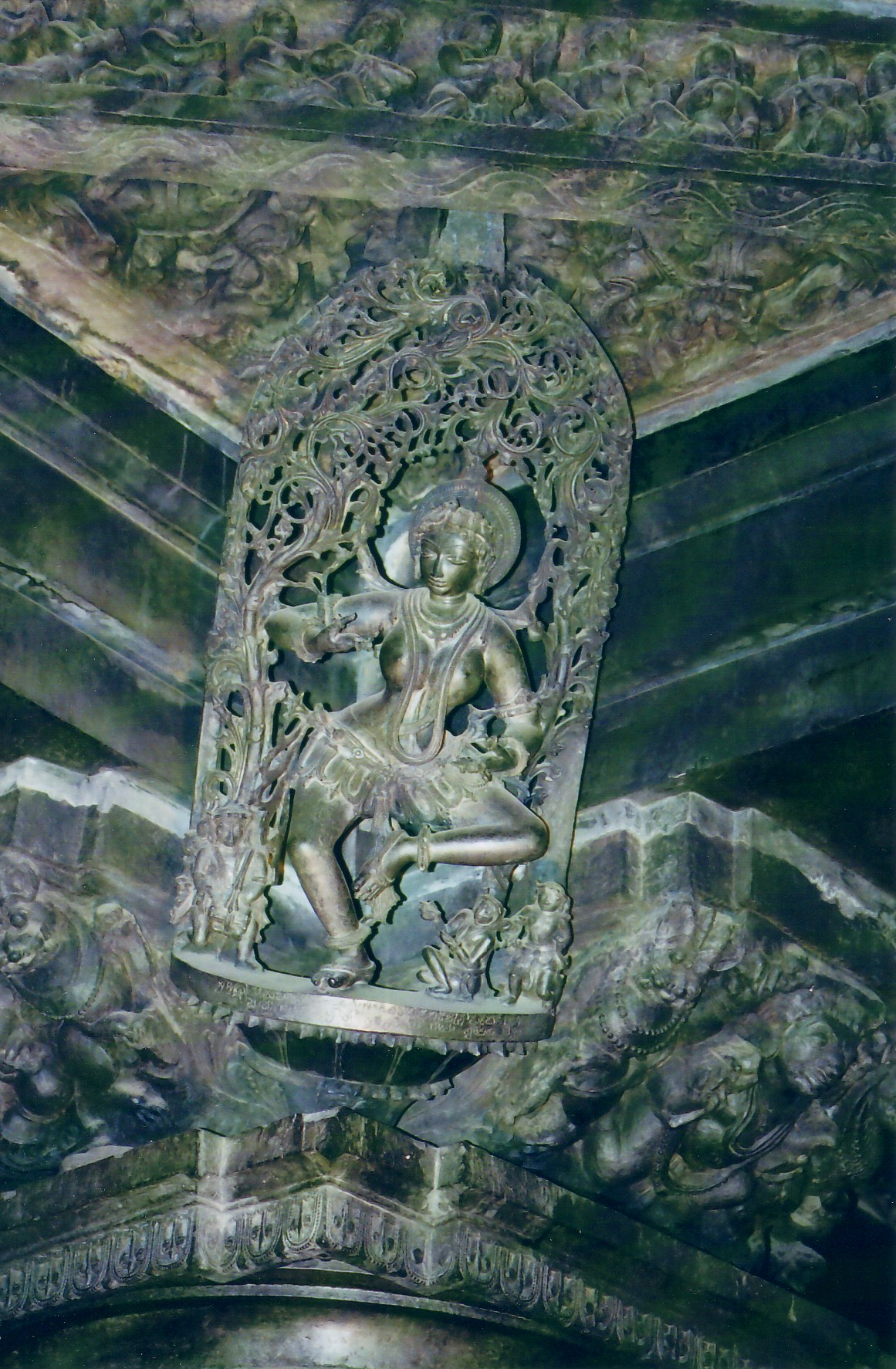 Chennakesava Temple in Belur, Karnataka, India